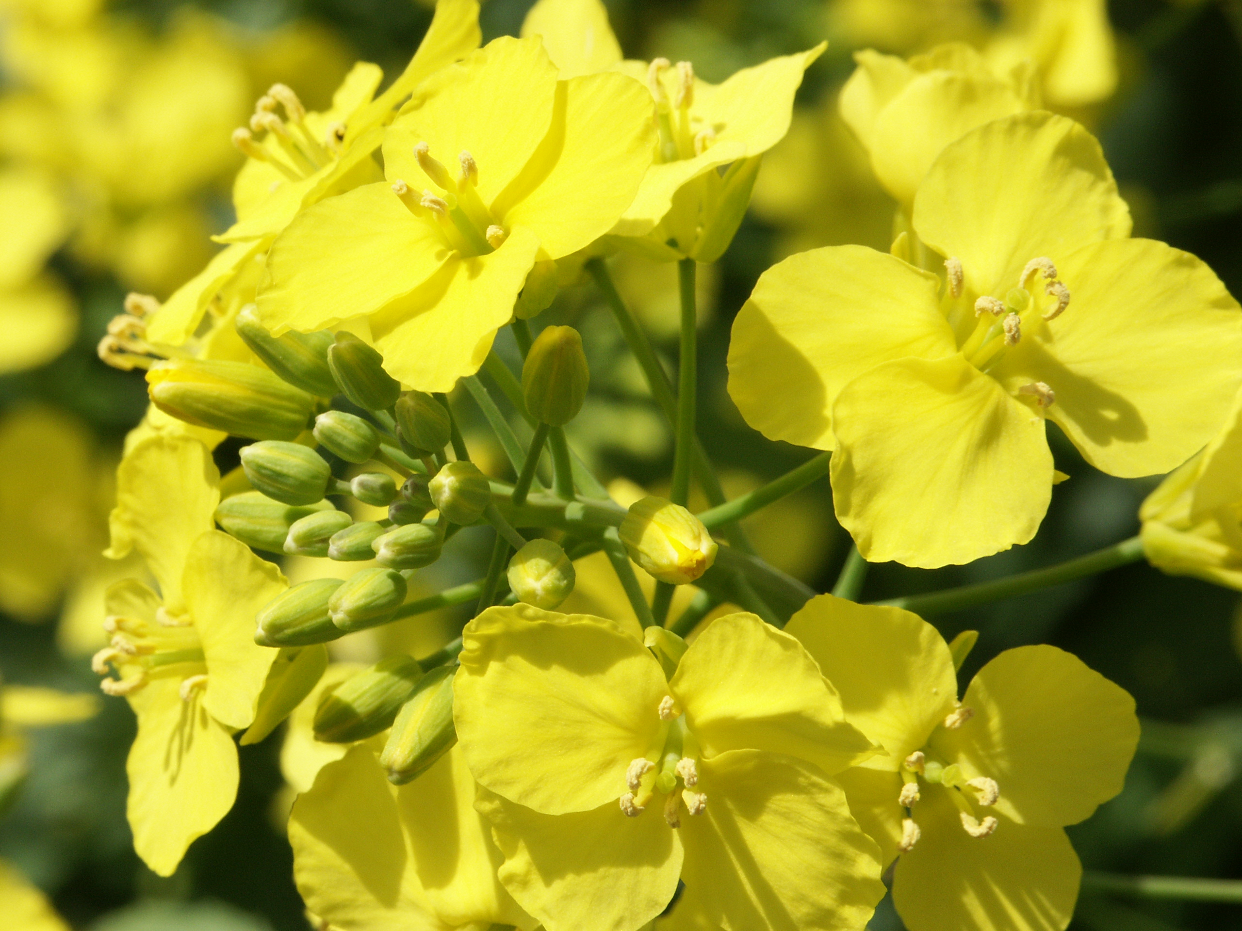 Blühender Raps